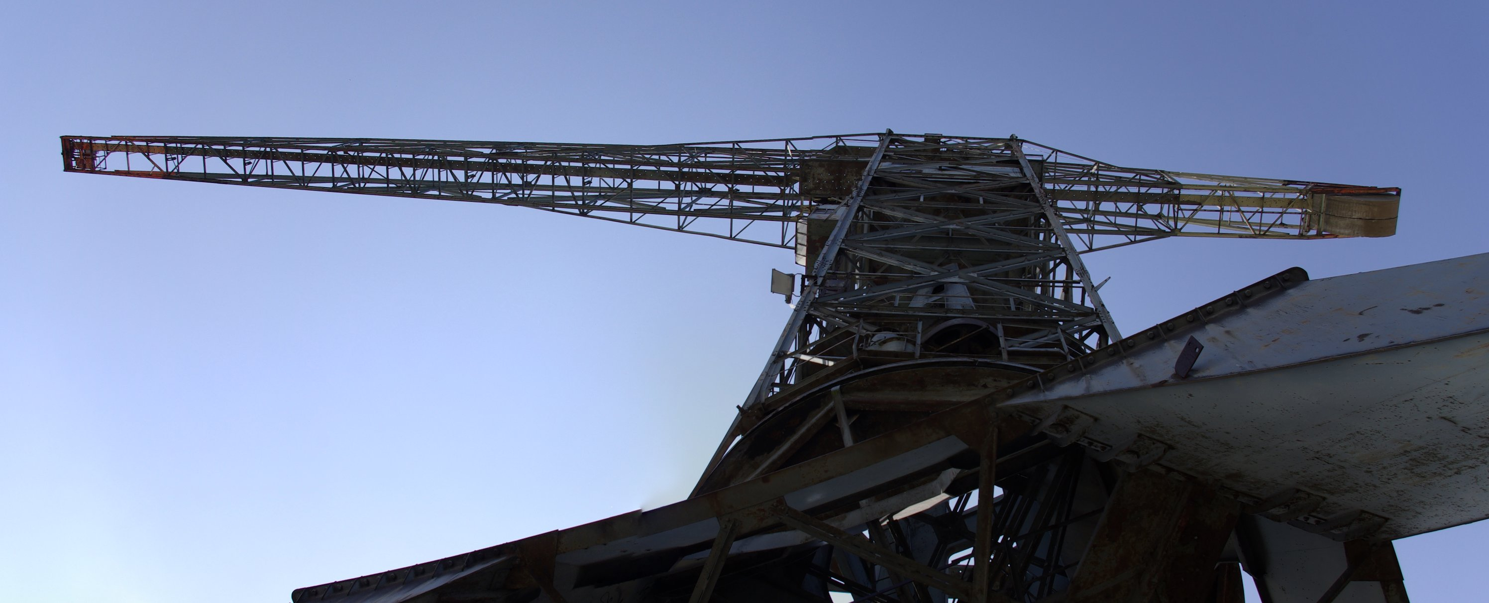 Terrein van de NDSM in Amsterdam